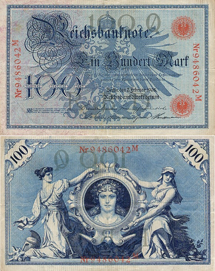 100 Mark Reichsbanknote